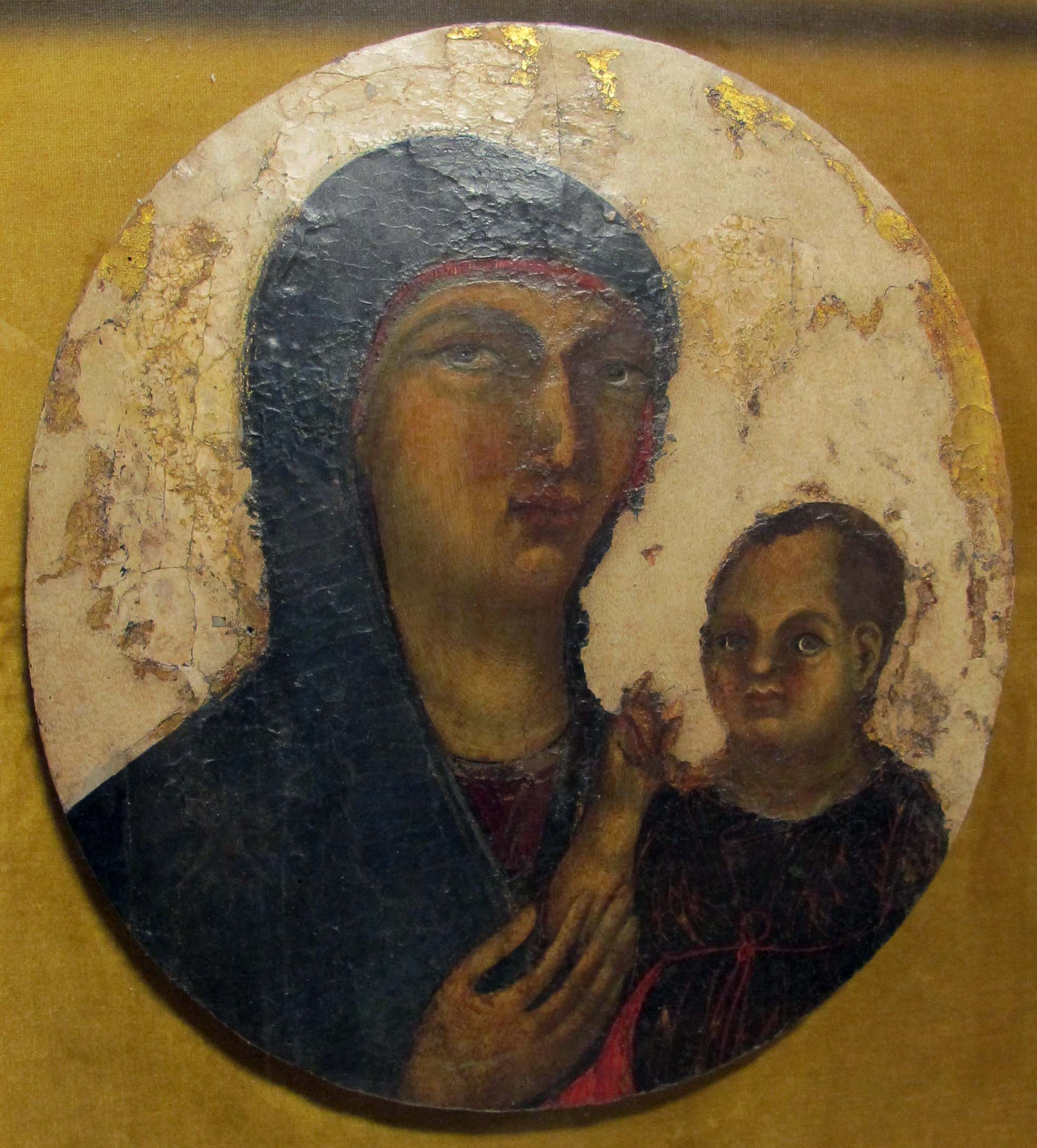 Museo diocesano (Siena)